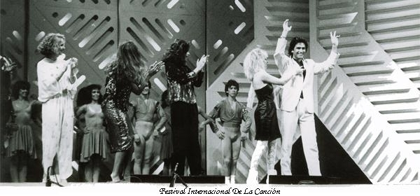 Alex Damiani premiato al Festival di Viña del Mar. Tratto dal sito (sito ufficiale del cantante e attore). Autorizzazione fornita direttamente dall'interessato. OTRS 2007050110001475